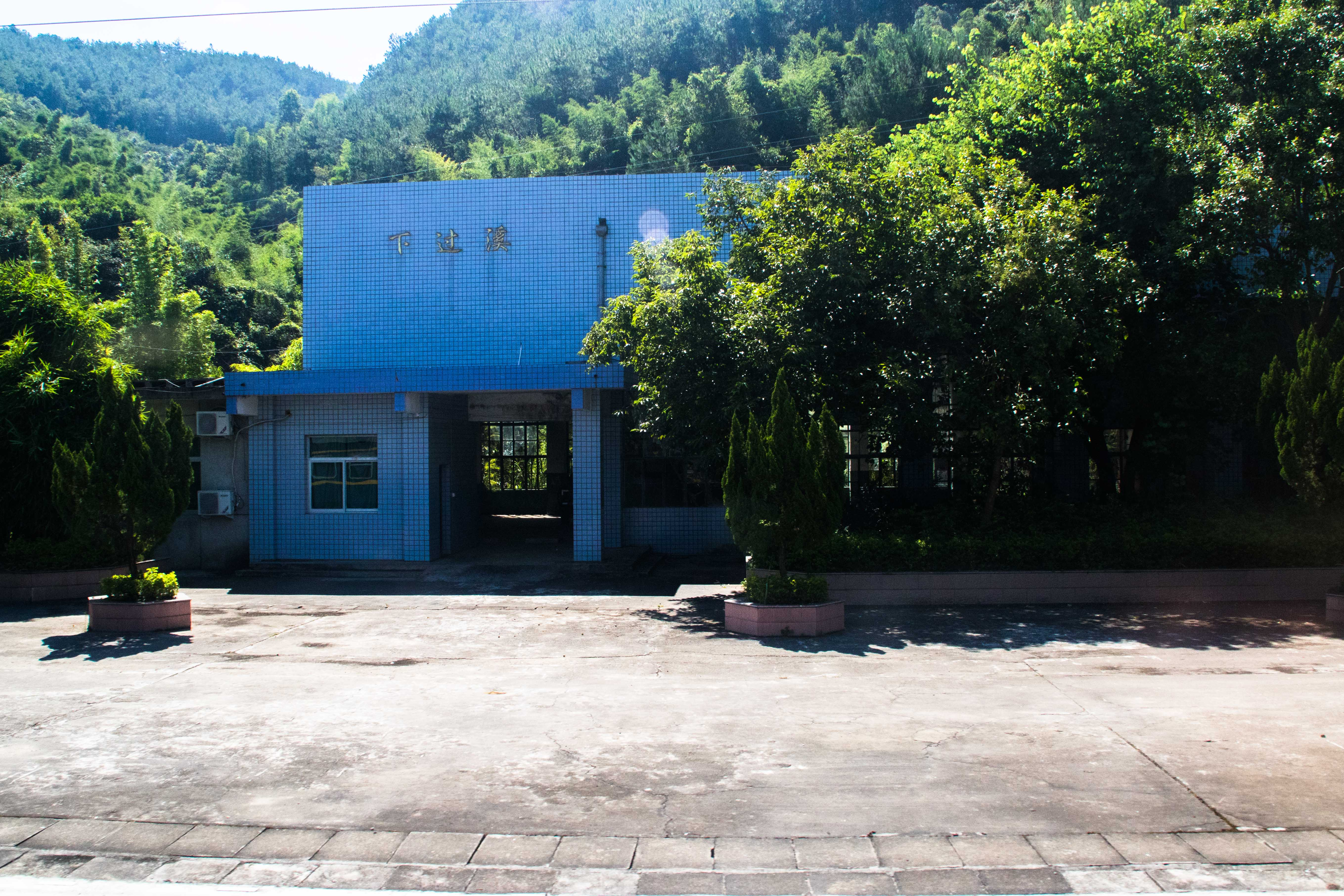 中文（中国大陆）: 下过溪站站房